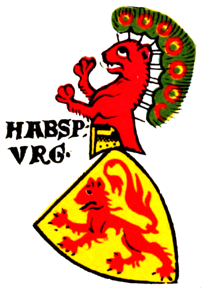 Wappen der Hapsburg